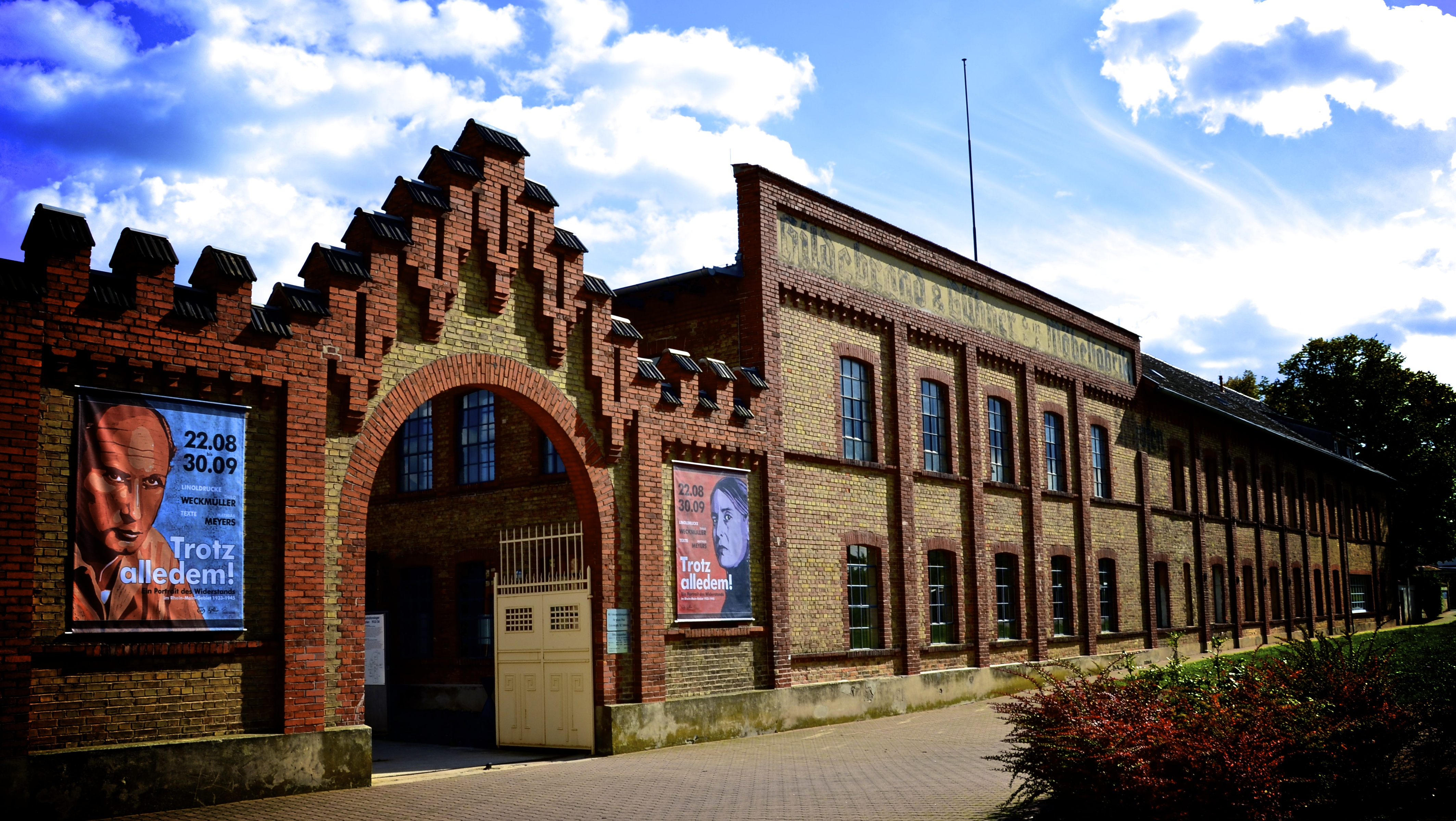 Ziegelhüttenweg 38: Gedenkstätte Osthofen (ehemaliges Konzentrationslager); gründerzeitliche Klinkerbauten, teilweise Zinnenkranz, 1872, Erweiterung 1908